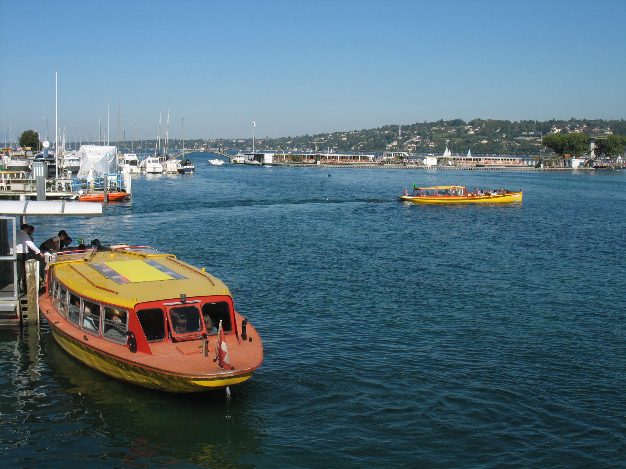 Mouettes genevoises.